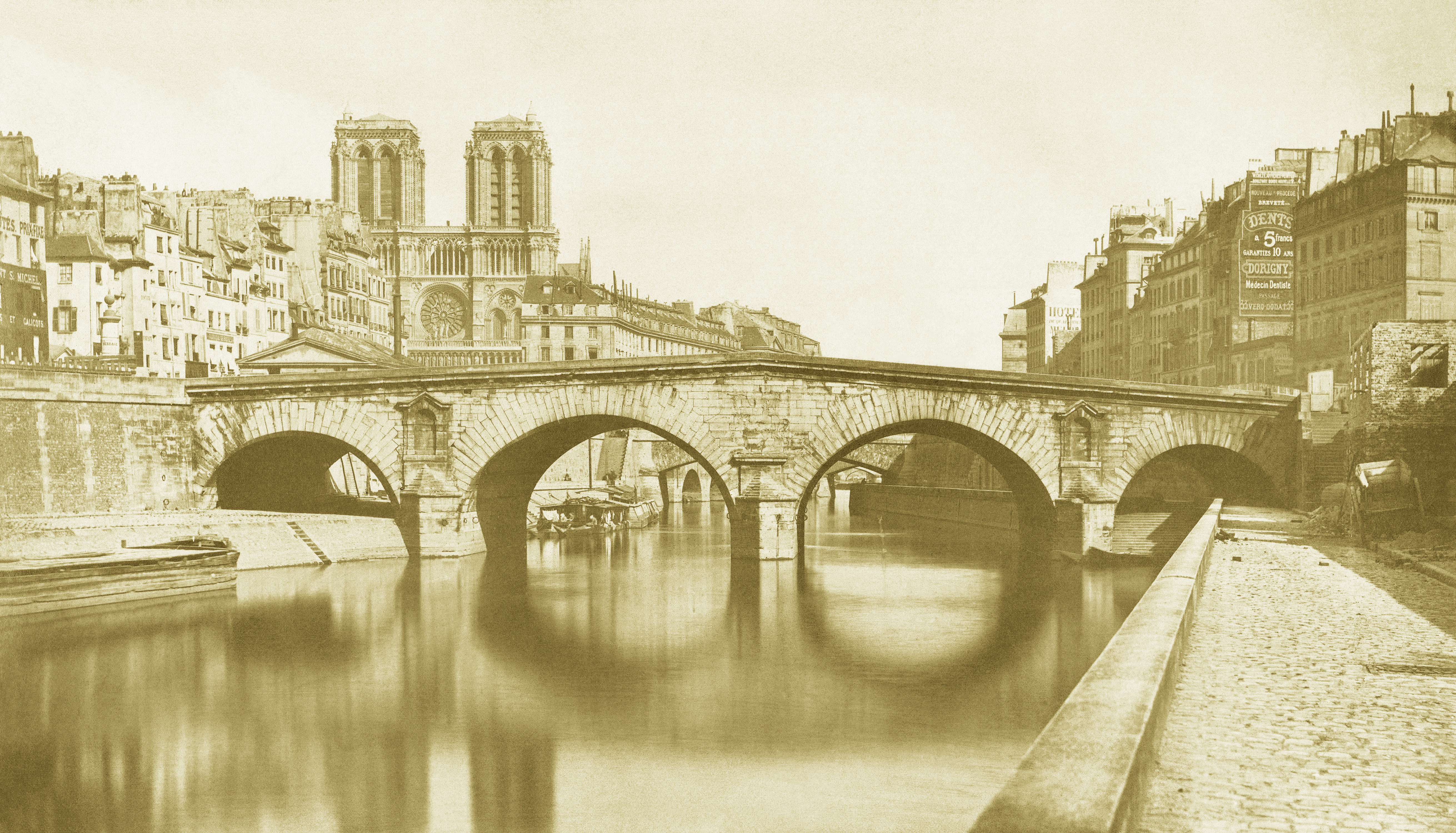 Vue de l’ancien pont Saint-Michel, prise le 12 mai 1857, jour où la circulation est complètement interdite.